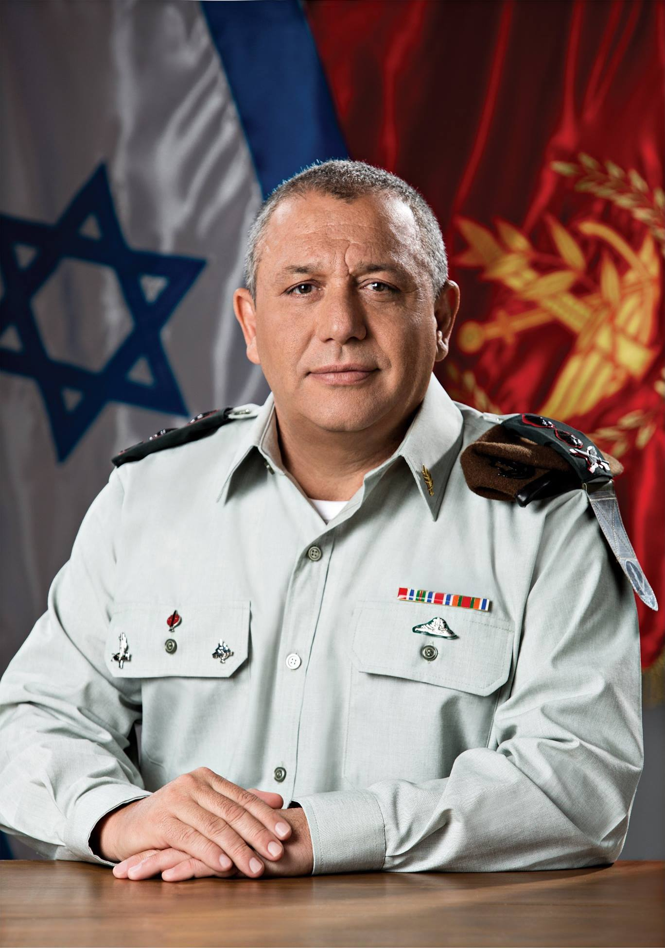 הרמטכ"ל רא"ל גדי איזנקוט.